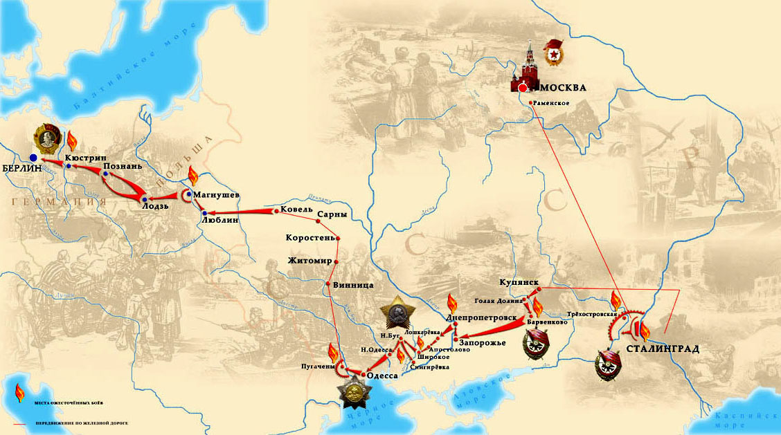 Боевой путь 39-й гвардейской стрелковой дивизии